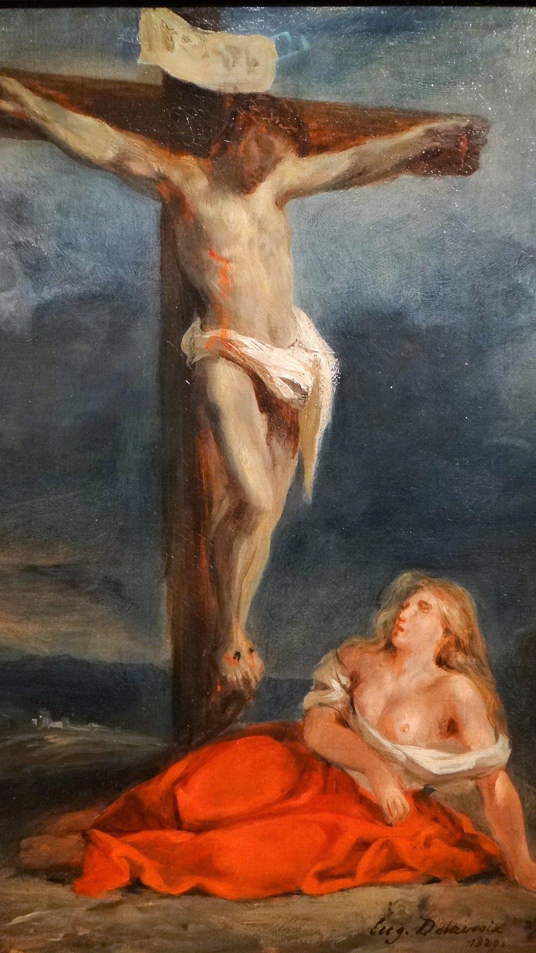 Sainte Marie Madeleine au pied de la croix, huile sur toile, 1829, Eugène Delacroix Musée des Beaux Arts de Houston